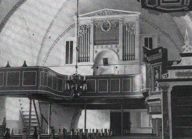 Winzerorgel zu Bruel